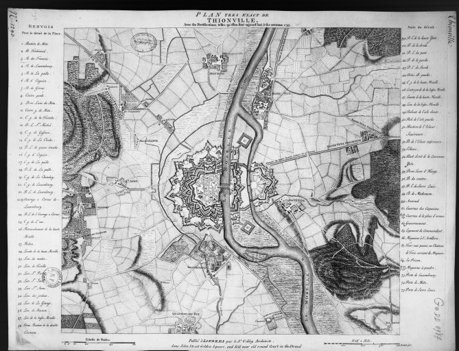 Plan tres exact de Thionville avec ses fortifications, telles qu'elles sont aujourd'hui, et ses environs. 1753 / par le Sr Ockley